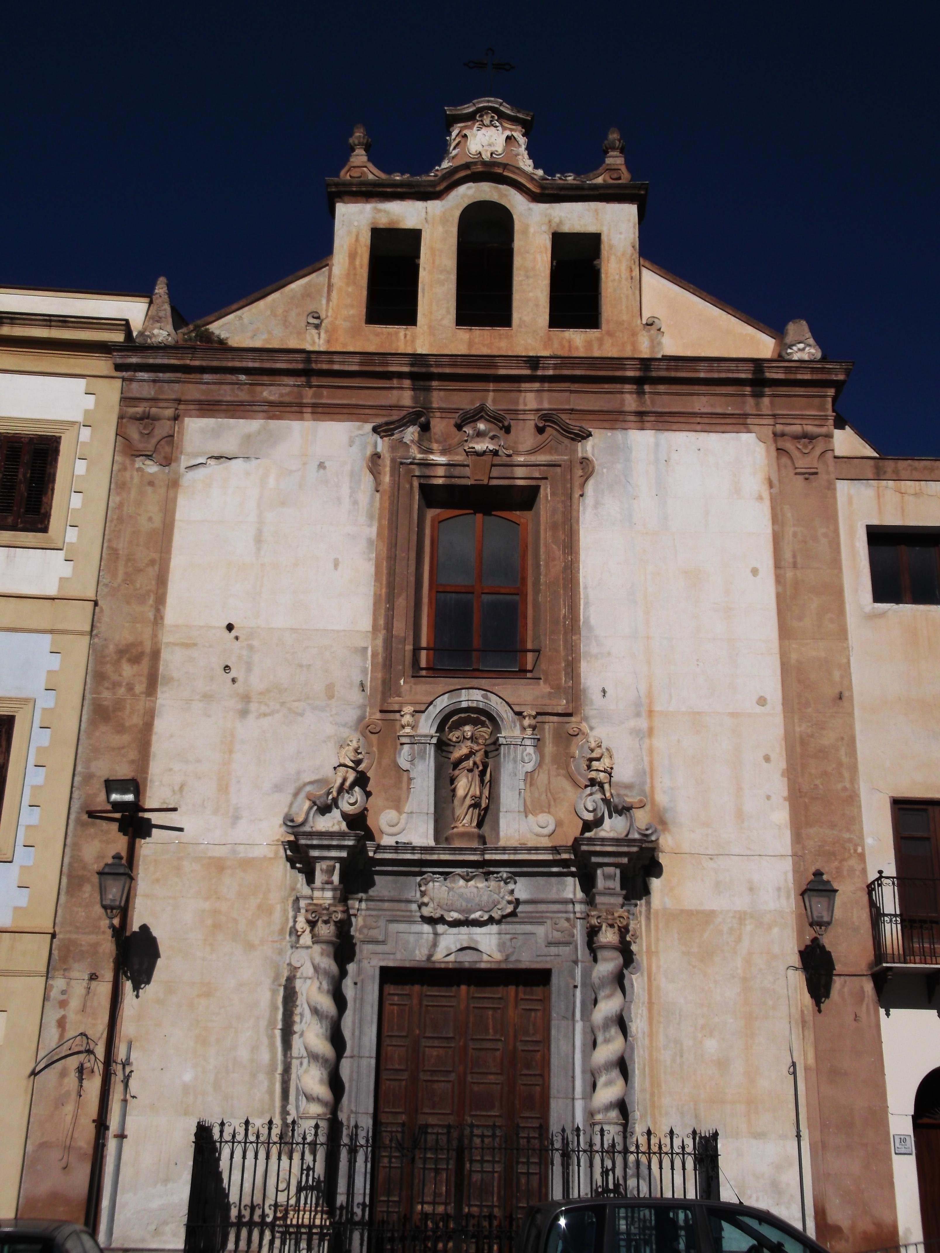 Facciata